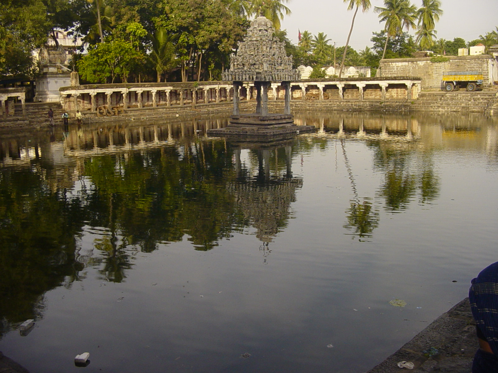 வில்லியனூர் திருக்காமீஸ்வரர் கோயிலும் தெப்பக்குளமும்